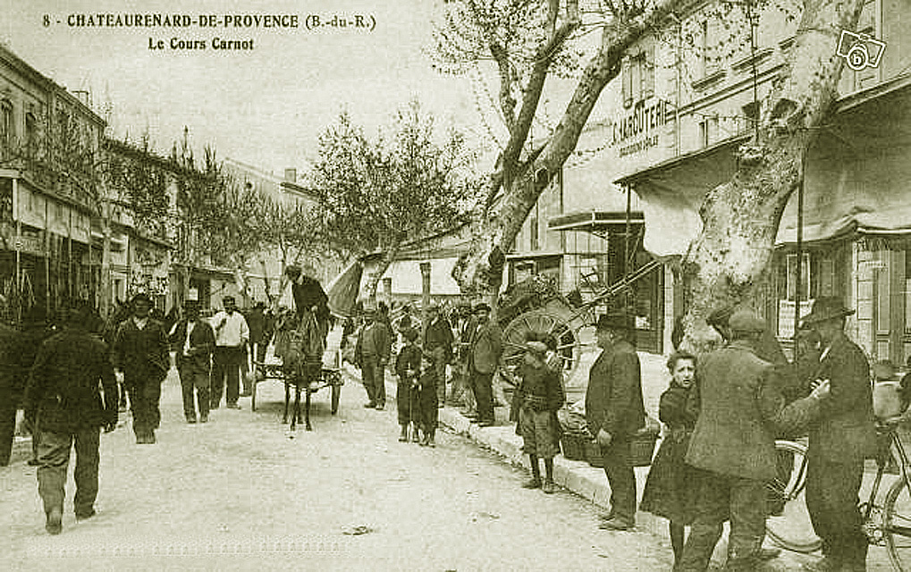 Le cours Carnot à Châteaurenard lors de l'installation du marché hebomadaire